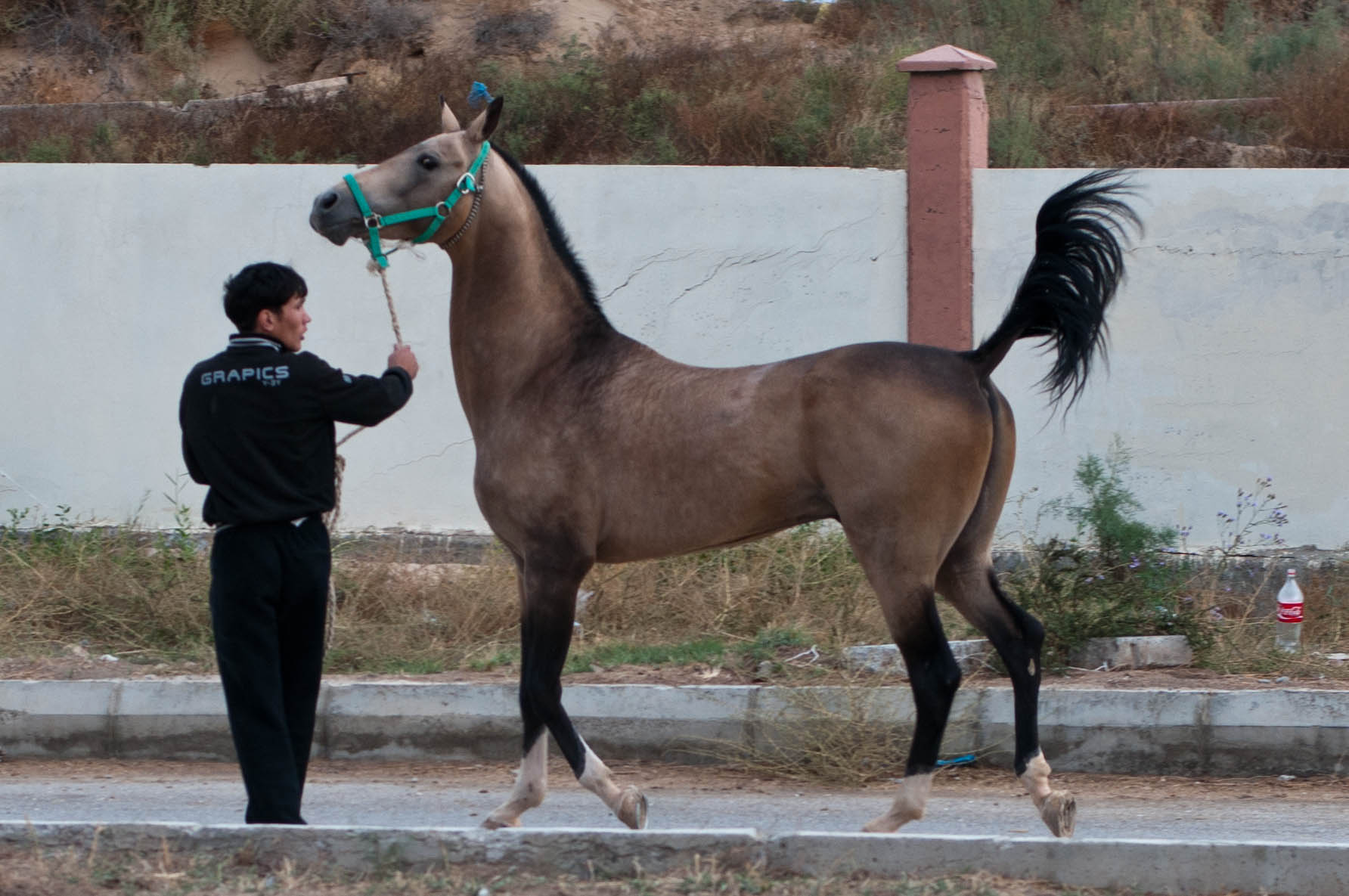 Studfarm in Turkmenistan